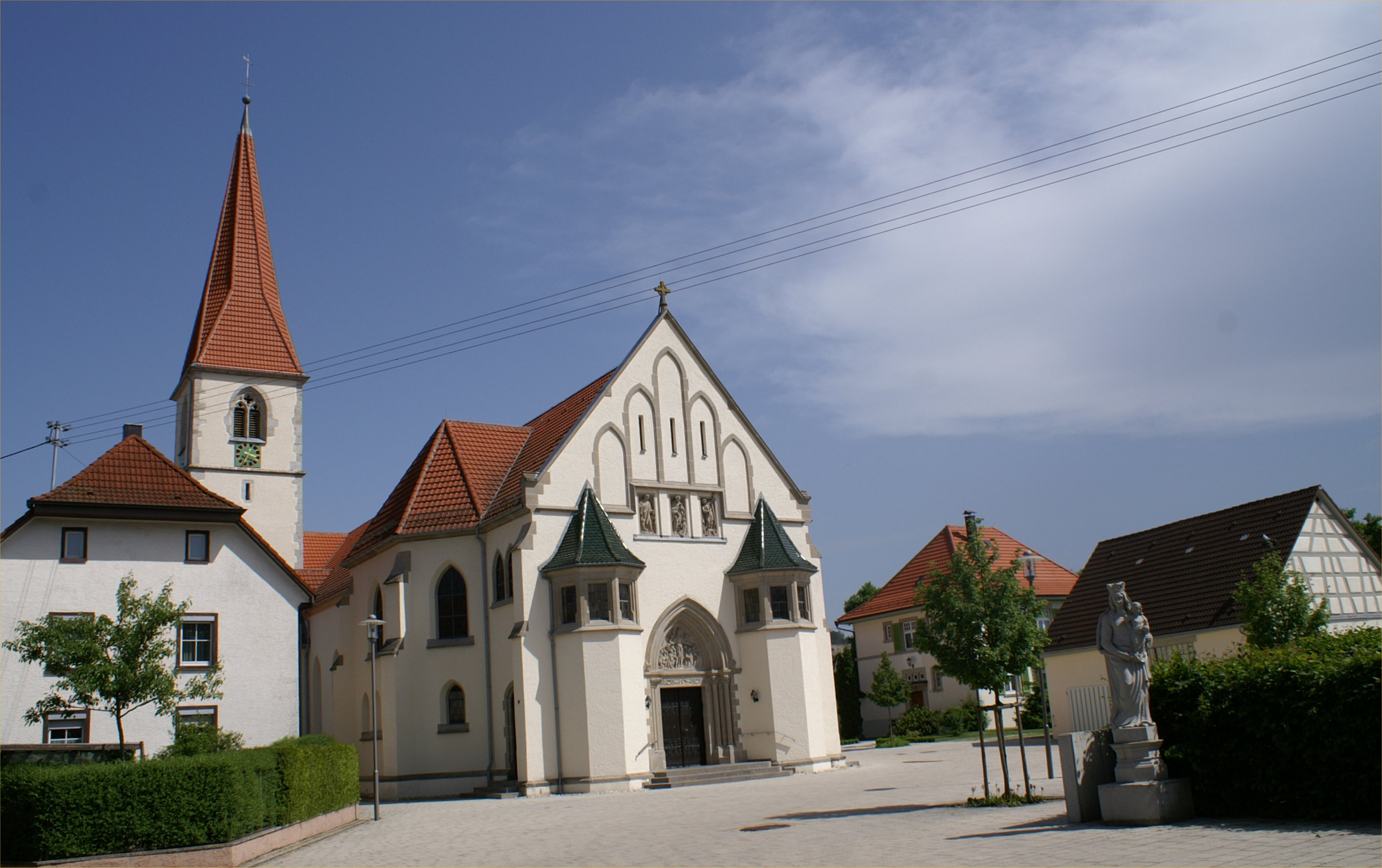 Pfarrkirche St. Maria Himmelfahrt in Allmendingen im Alb-Donau-Kreis